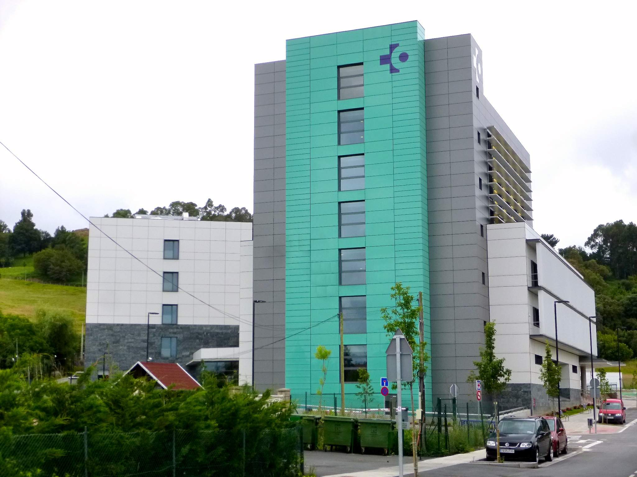 Urduliz (Bizkaia) - Hospital Alfredo Espinosa, adscrito a Osakidetza-Servicio Vasco de Salud